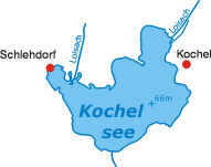 Kochelsee Johannes Aubele Beschreibung: Der Kochelsee am bayrischen Alpenrand Quelle: Selbst gezeichnet September 2004